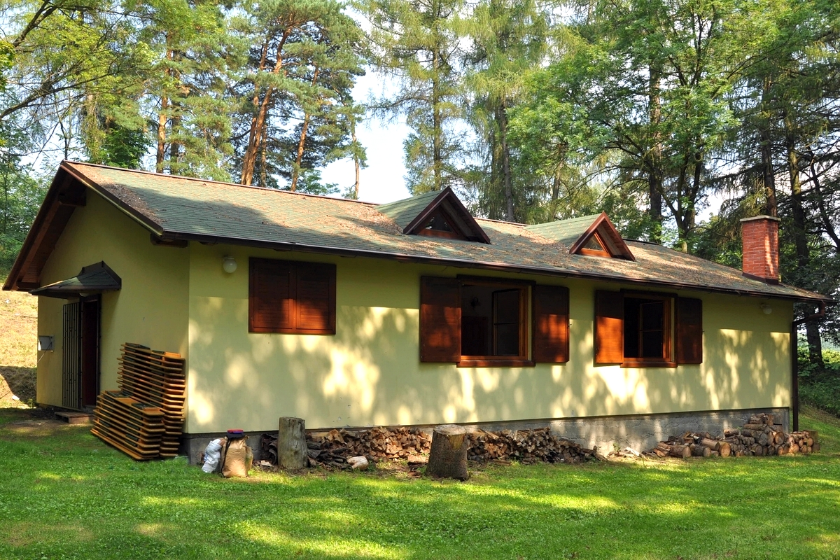 Rekreační středisko "Letná"